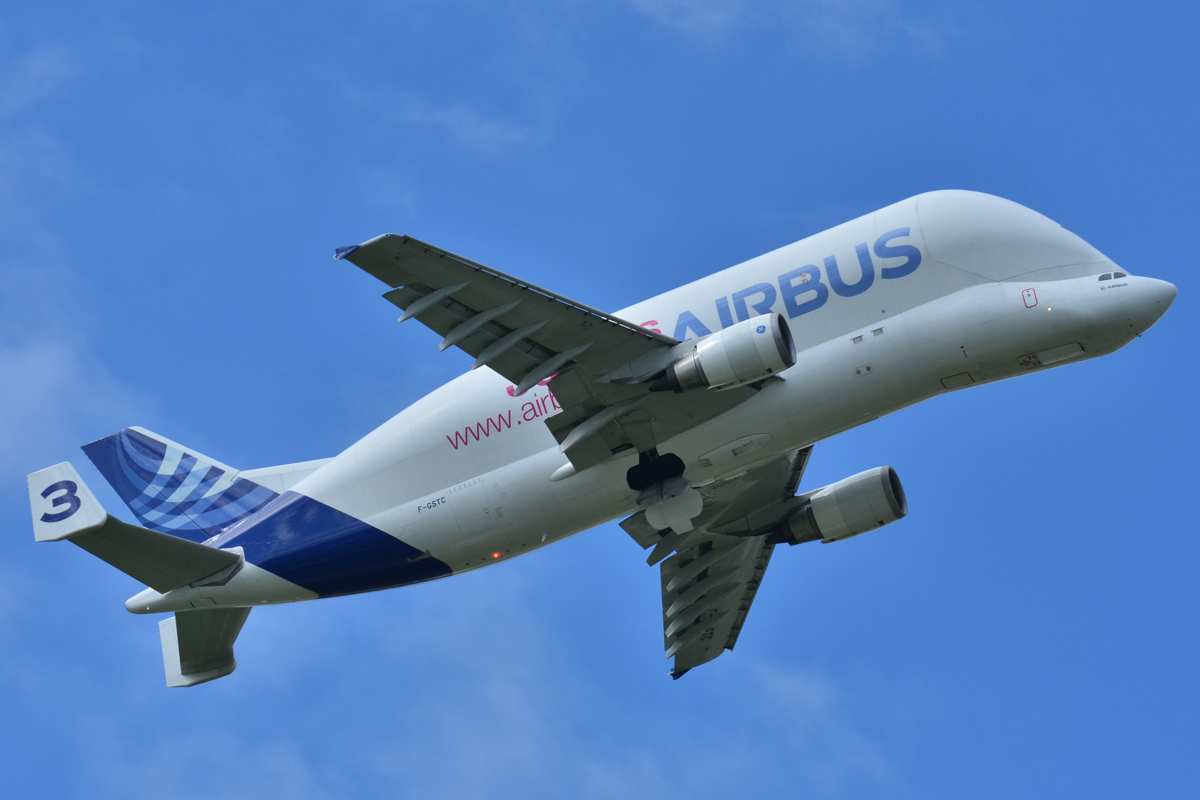 Photo prise à l'aéroport de Toulouse-Blagnac (LFBO) en France. Picture take at Toulouse-Blagnac Airport (LFBO) in France.